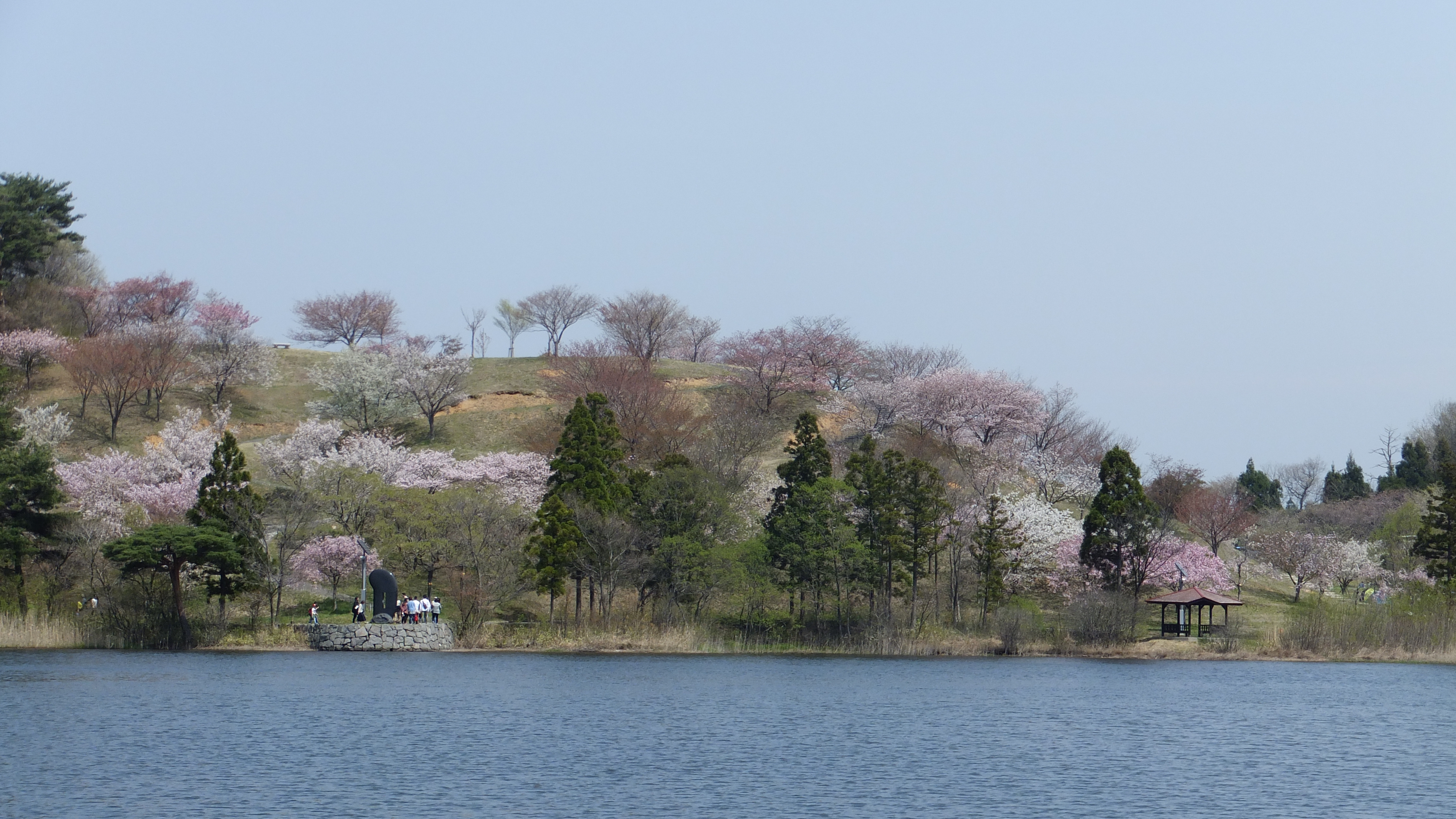 秋田県南秋田郡井川町 日本国花苑。園内には日本各地より集められた200種2,000本の桜が植樹されており、秋田県内有数の花見スポットとなっている。